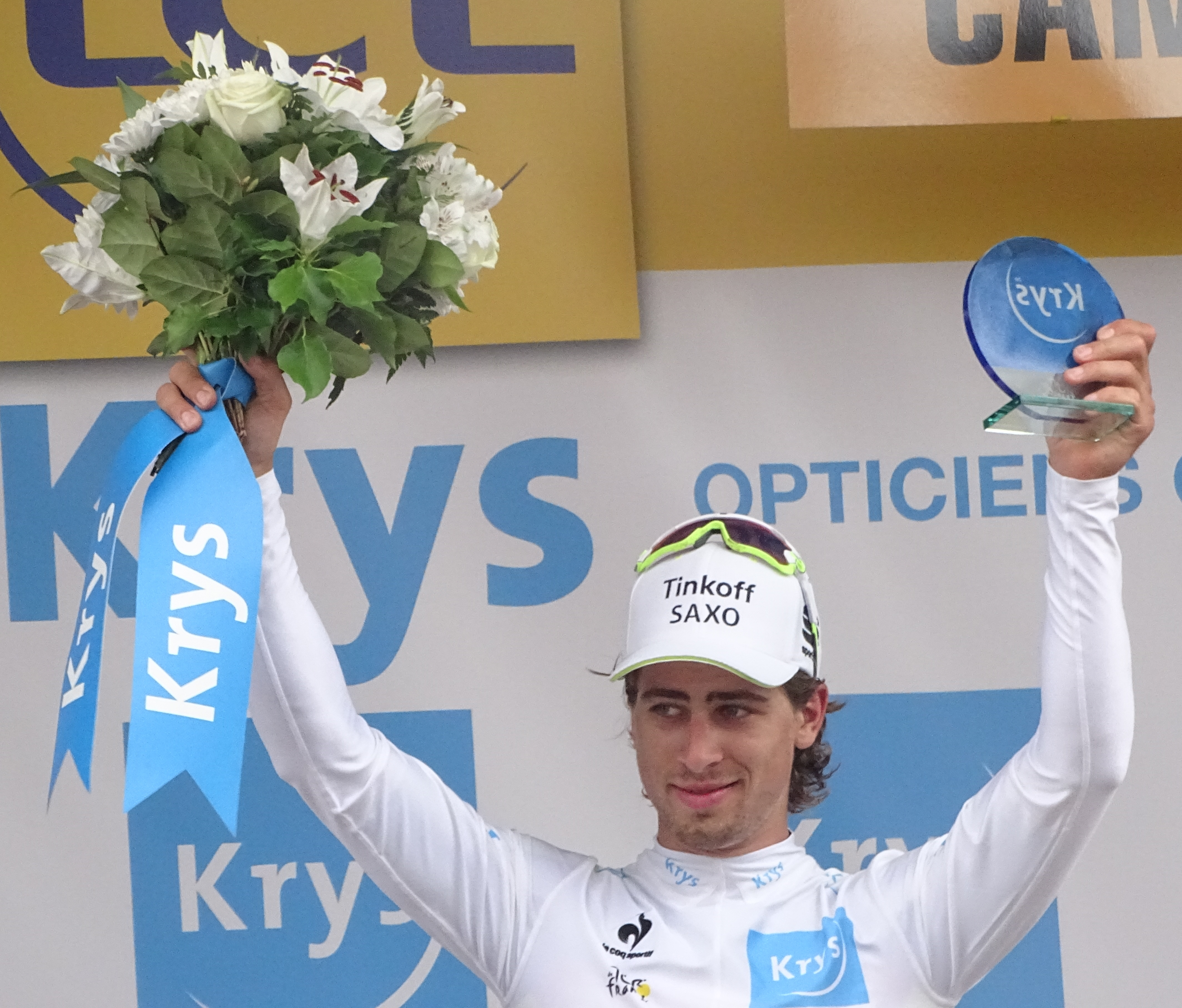 Reportage réalisé le mardi 7 juillet à l'occasion de l'arrivée de la quatrième étape du Tour de France 2015 à Cambrai, Nord-Pas-de-Calais, France.